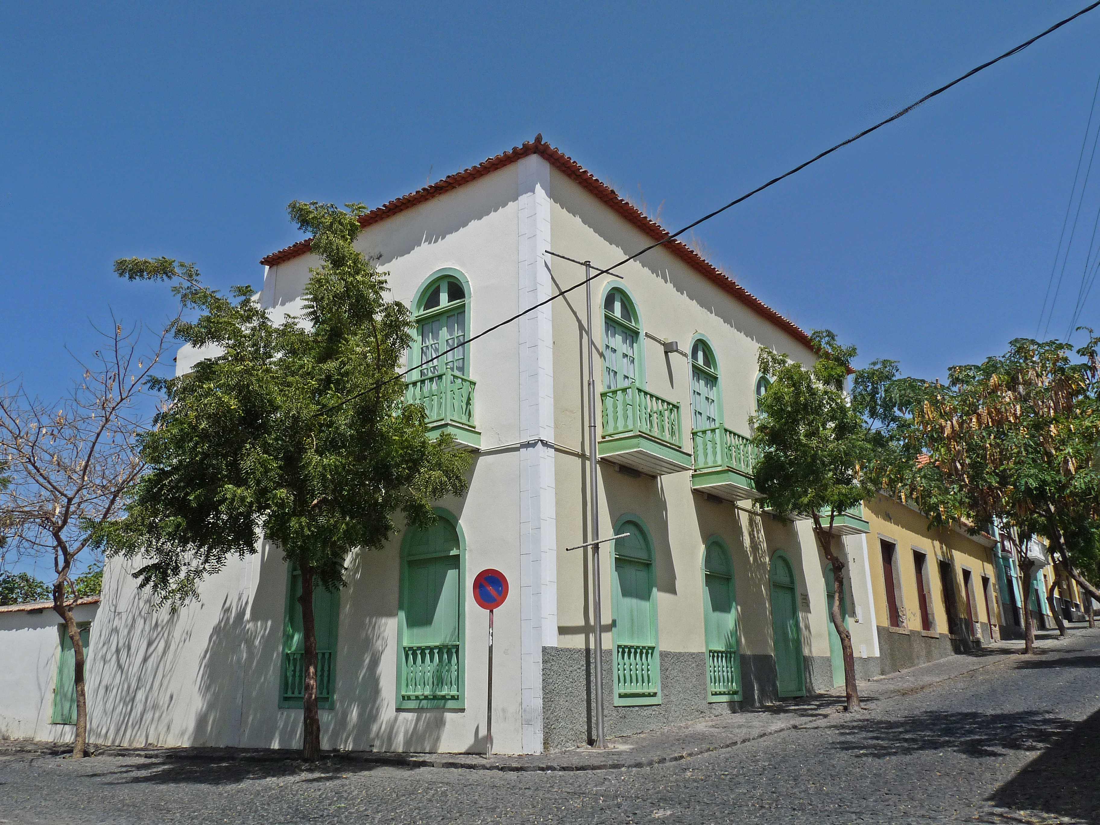 São Filipe (île de Fogo, Cap-Vert) : musée municipal